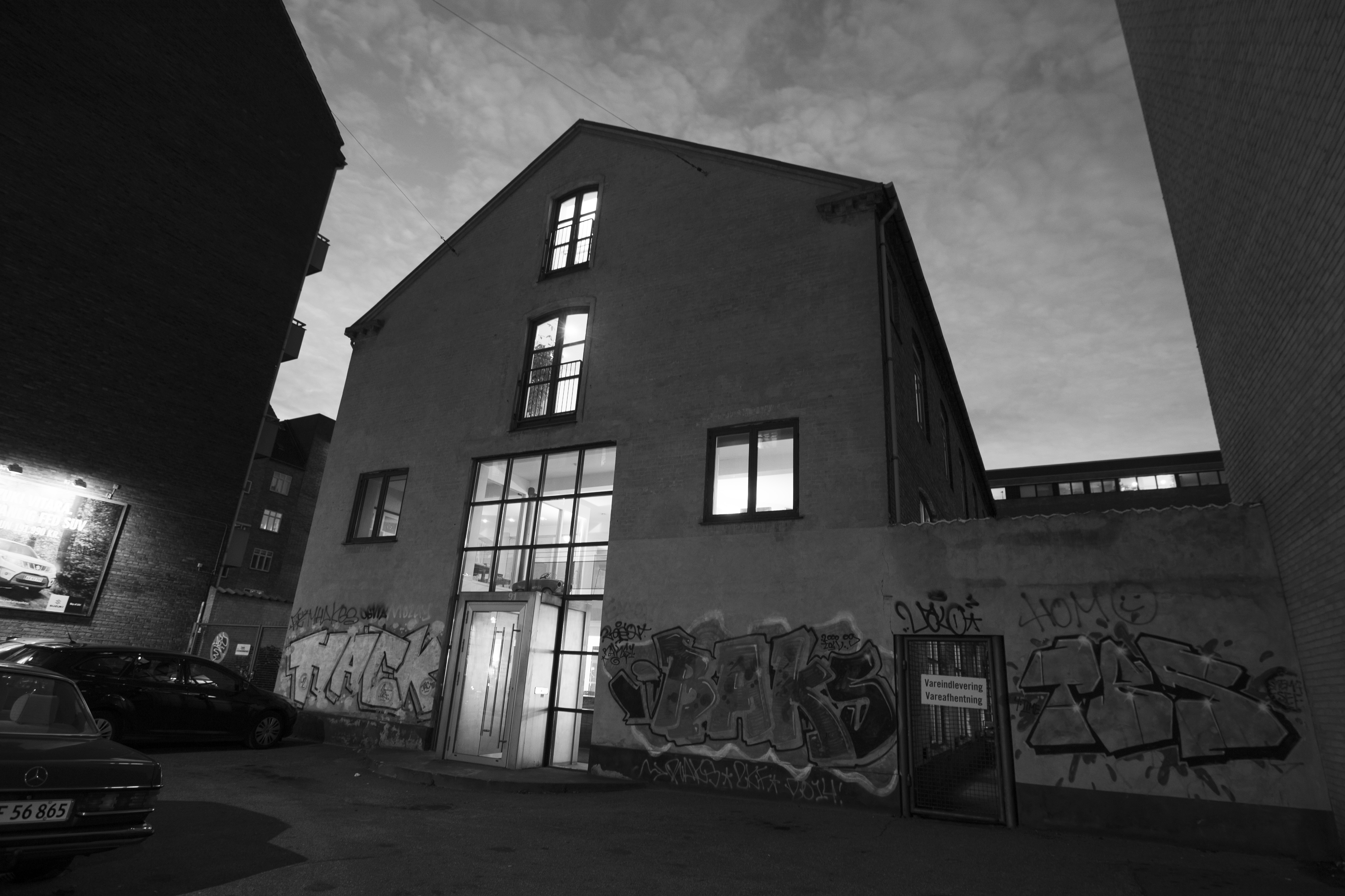 Fotografi af den gamle fabriksbygning, som i dag huser Sylvester Hvid & Co.